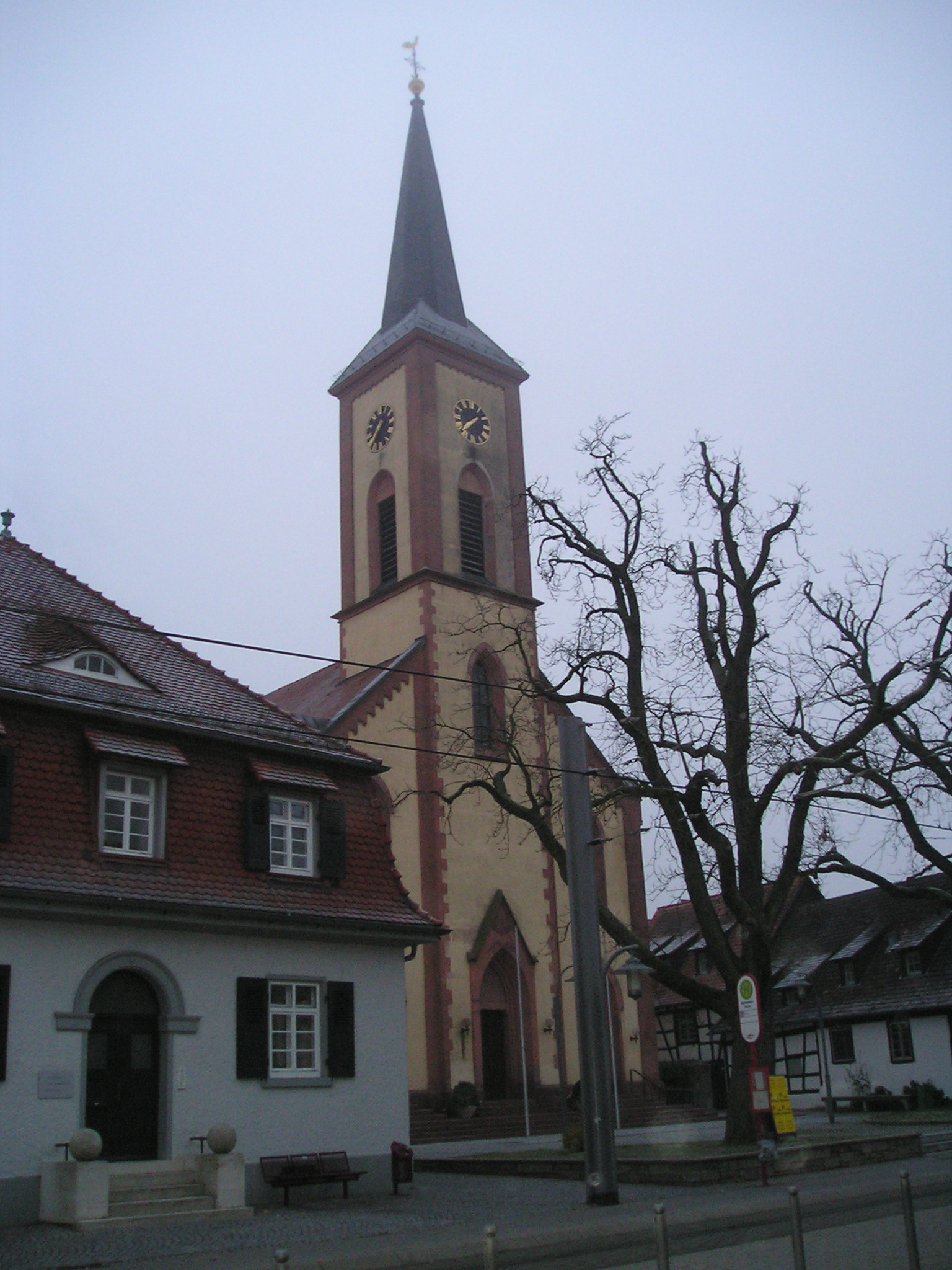 Prot. Church in Stutensee-Blankenloch, Germany